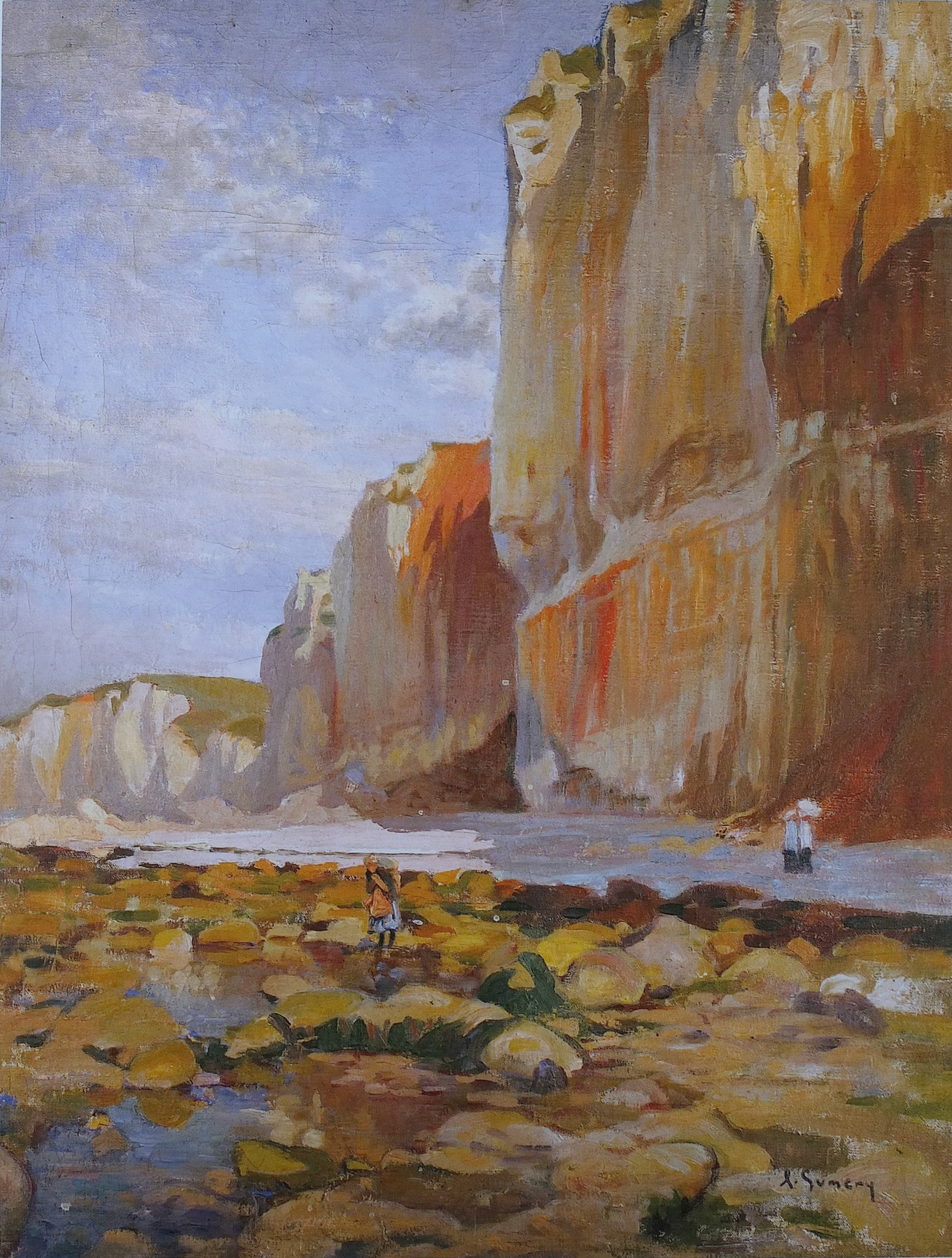 La Grande Falaise d'Yport, huile sur toile d'Adolphe Gumery, 1915, 85 x 64. Association des amis du peintre Adolphe Gumery.